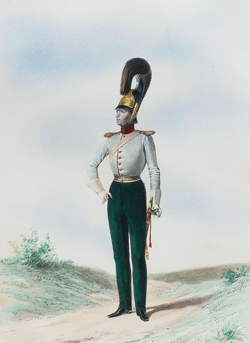 Обер-офицер Глуховского Кирасирского полка. 1827-1835.